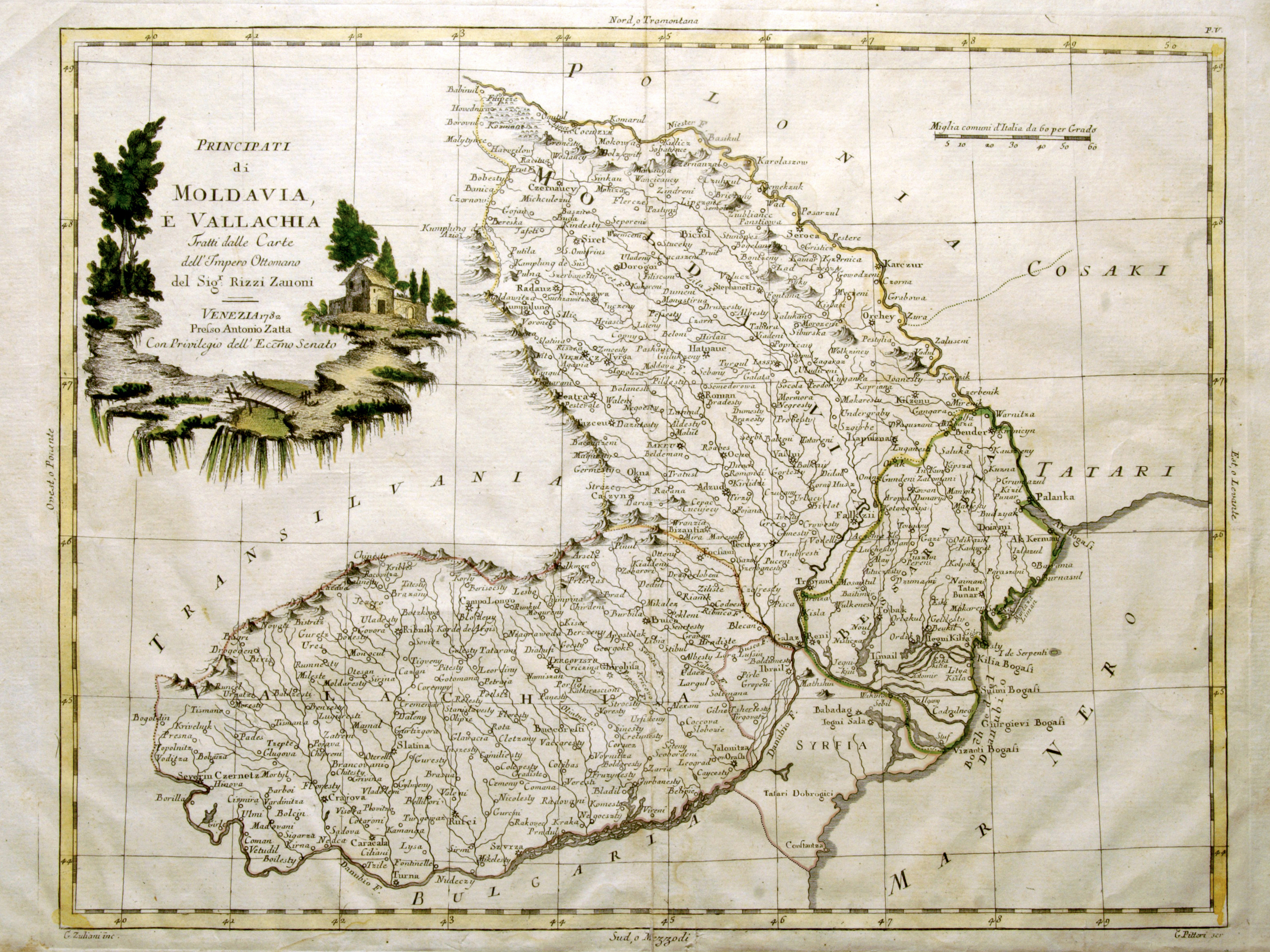 Harta principatelor Moldova şi Țara Românească, de G. Pittori, după geograful Giovanni Antonio Rizzi Zannoni, Veneţia 1782.